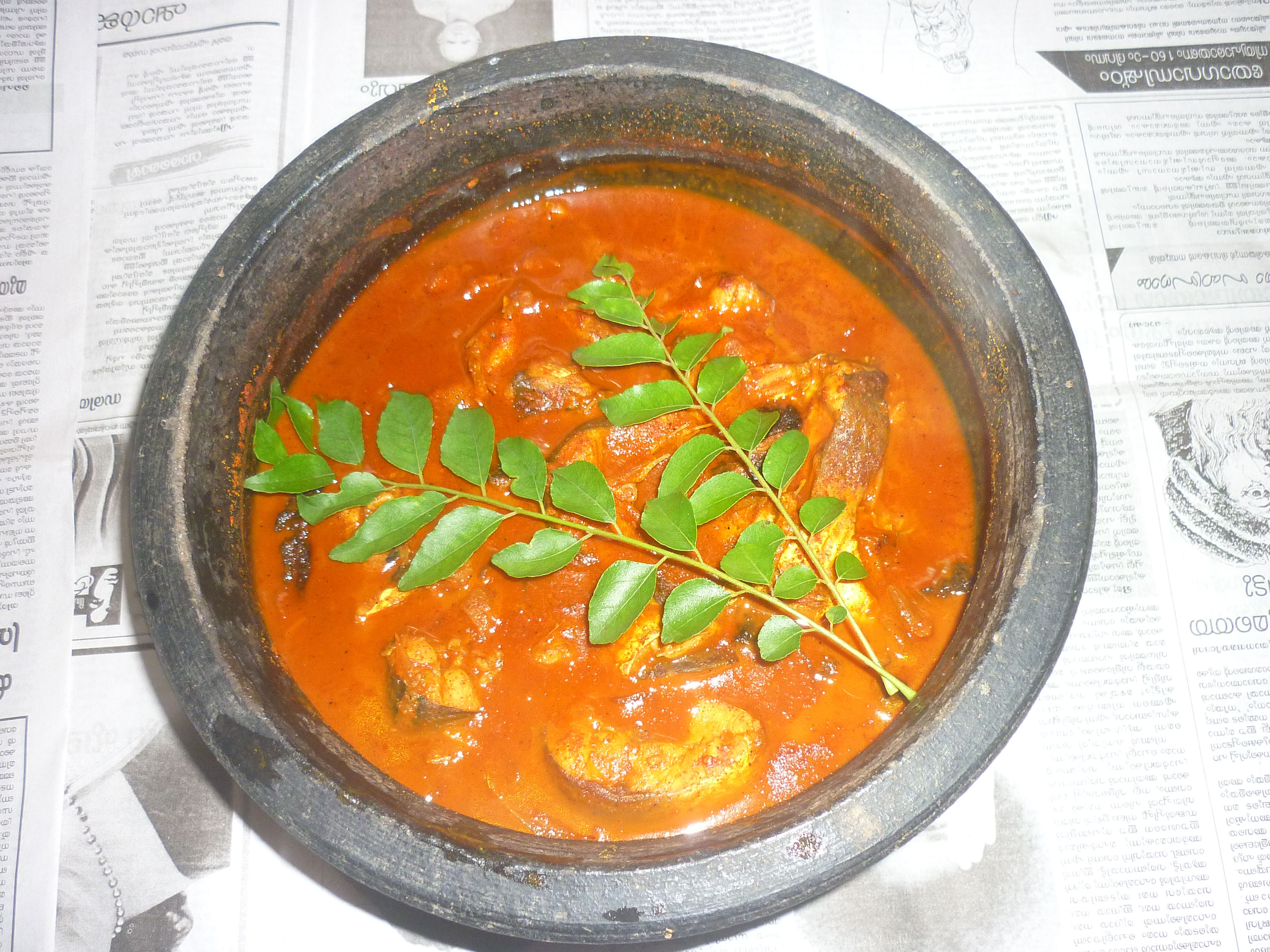 തൂളി മുളക് കറി